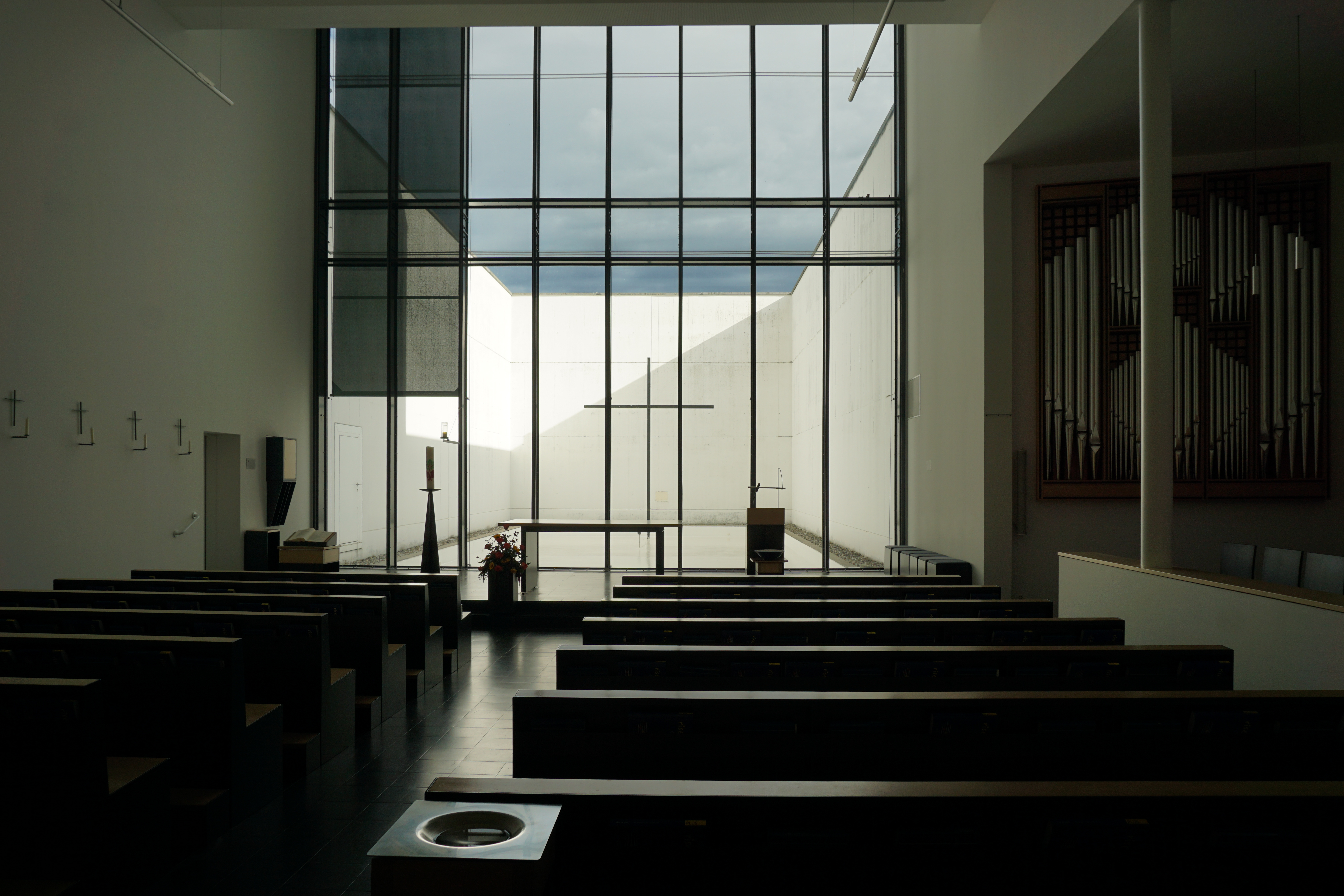 St. Martin, Innen